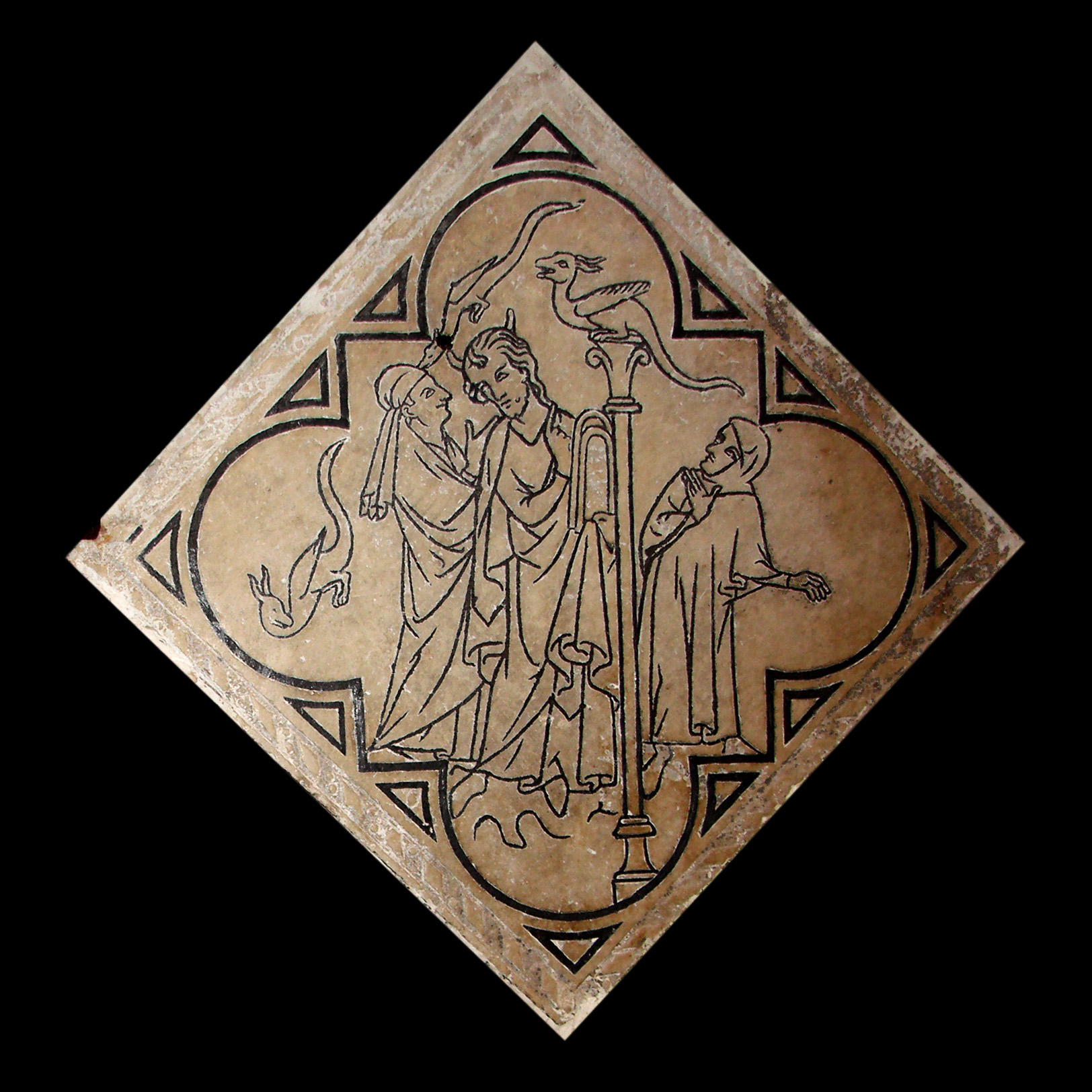 Dalle gravée avec incrustations de plomb, provient du dallage de l'église St Nicaise,exposée dans la basilique St Remi de Reims.